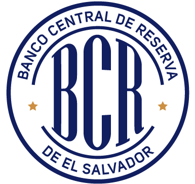 Banco Central de Reserva de El Salvador